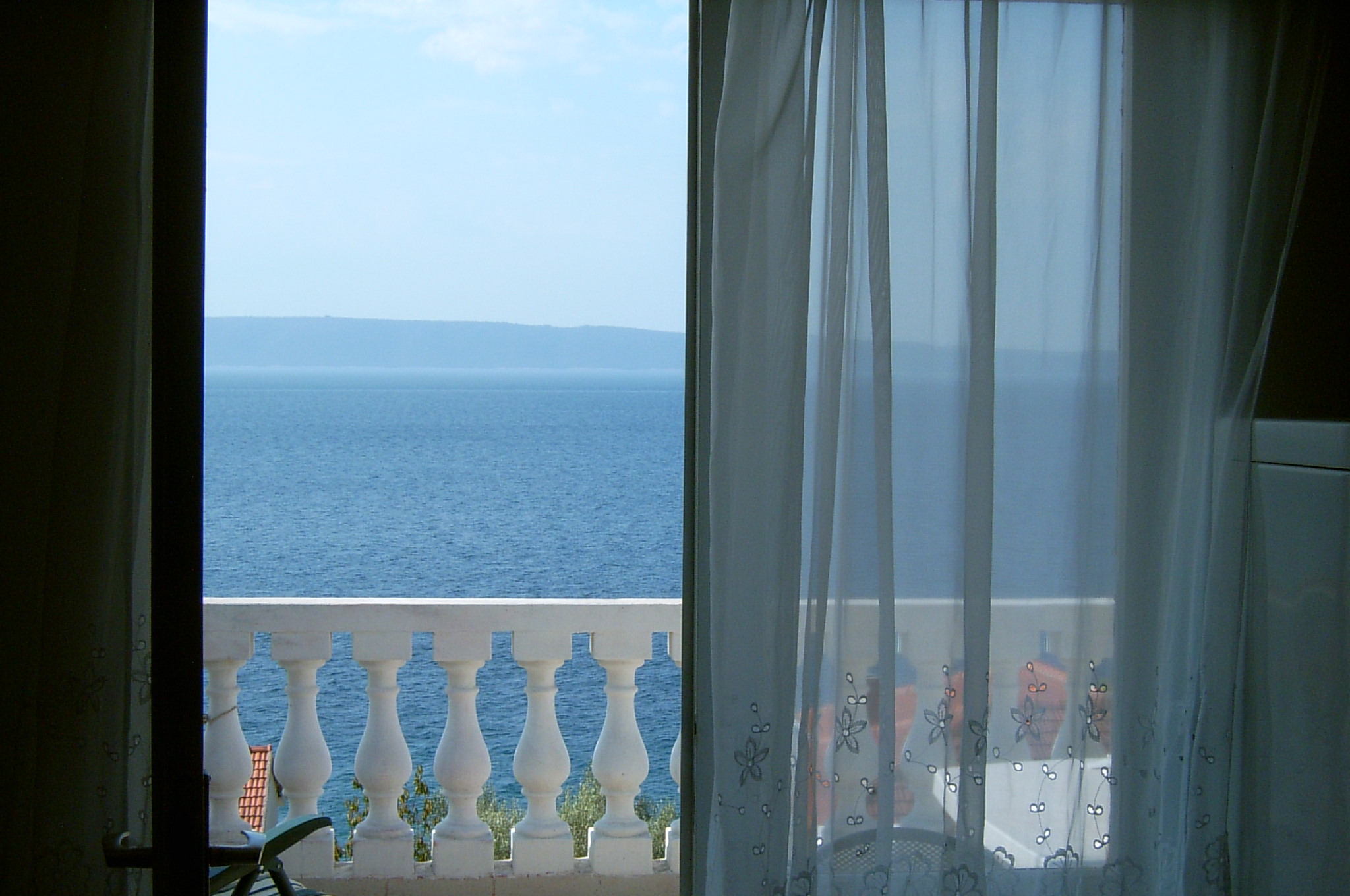 Chorwacja, Gornij Okrog na wyspie Ciovo